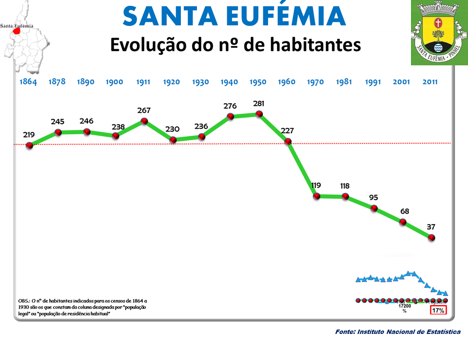 Censo 1864/2111